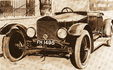 1920 Maiflower